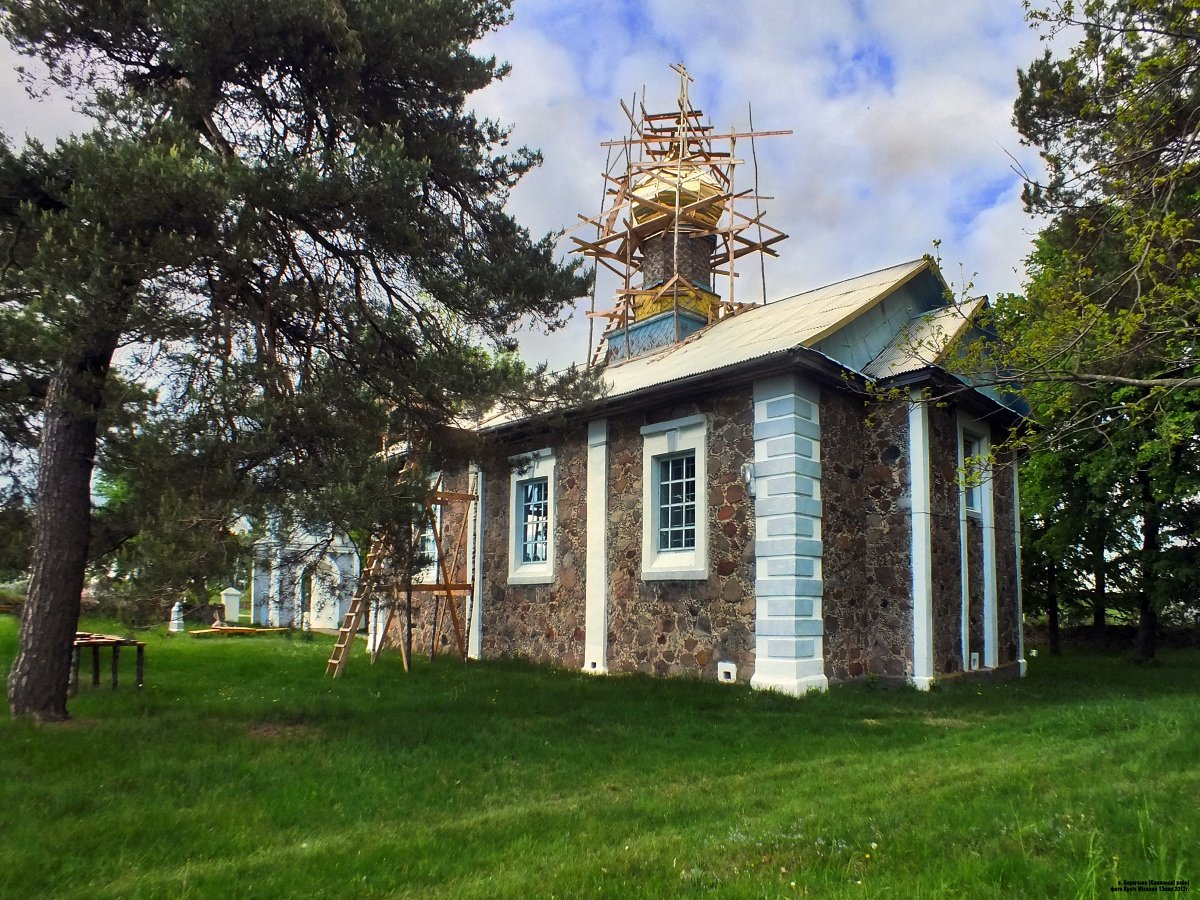 Баршчэва. Свята-Ануфрыеўская царква